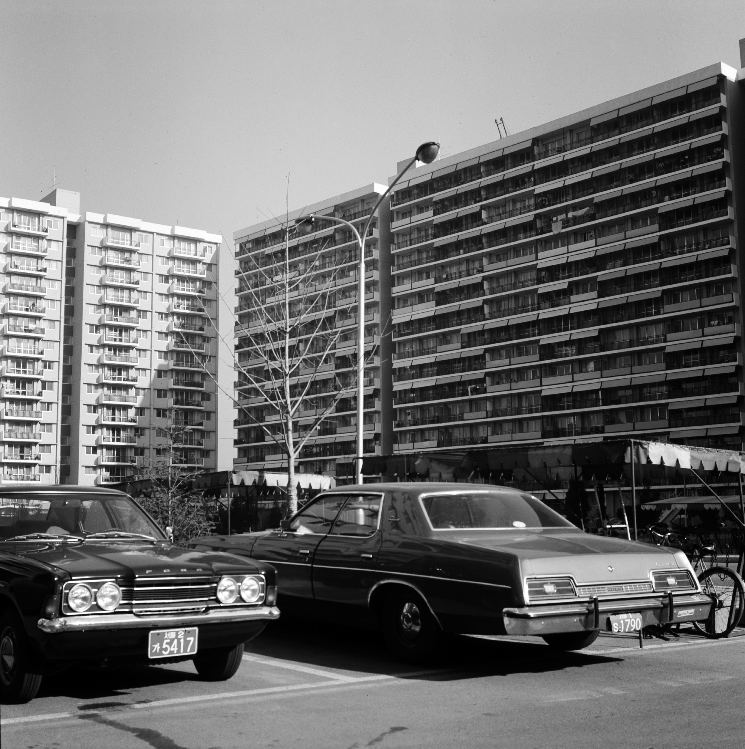 촬영일 : 1976년 12월 29일 촬영장소 : 대한민국 서울 한강변 참석자 : 없음 관련내용 : 서울 한강변의 맨션아파트 전경